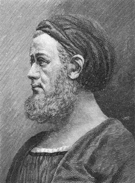 Adam Kraft (wahrscheinlich Fantasie-Porträt des 19. Jh.)